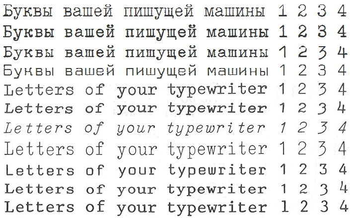 Образцы классических моноширных шрифтов пишущих машин.